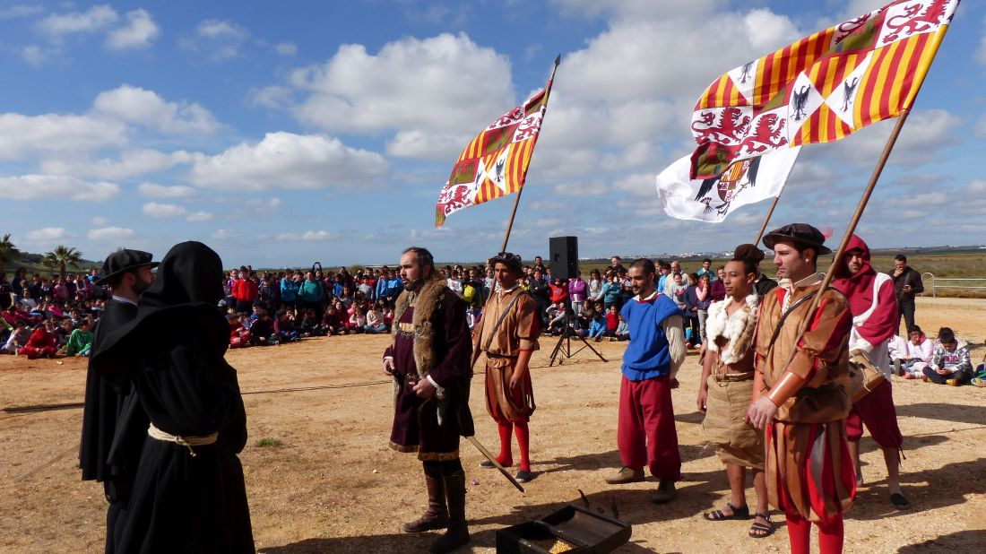 Recreación del Voto Colombino a su llegada al Monasterio de Santa Clara de Moguer. (España)